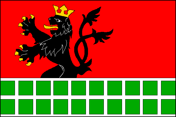 vlajka, Vikýřovice, okres Šumperk